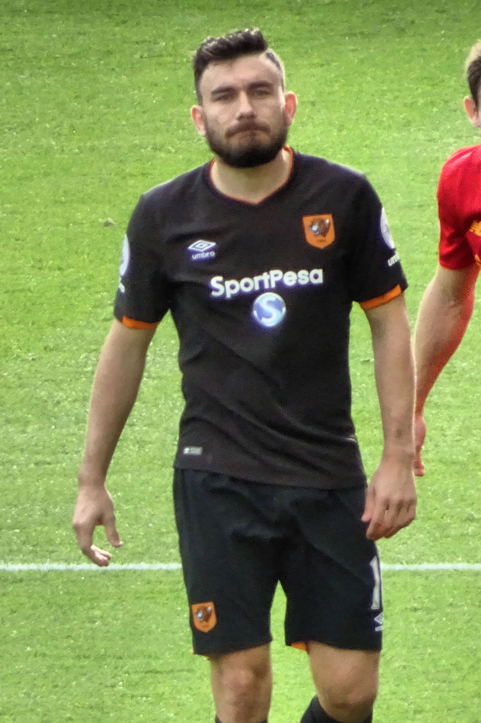 Robert Snodgrass. James Milner